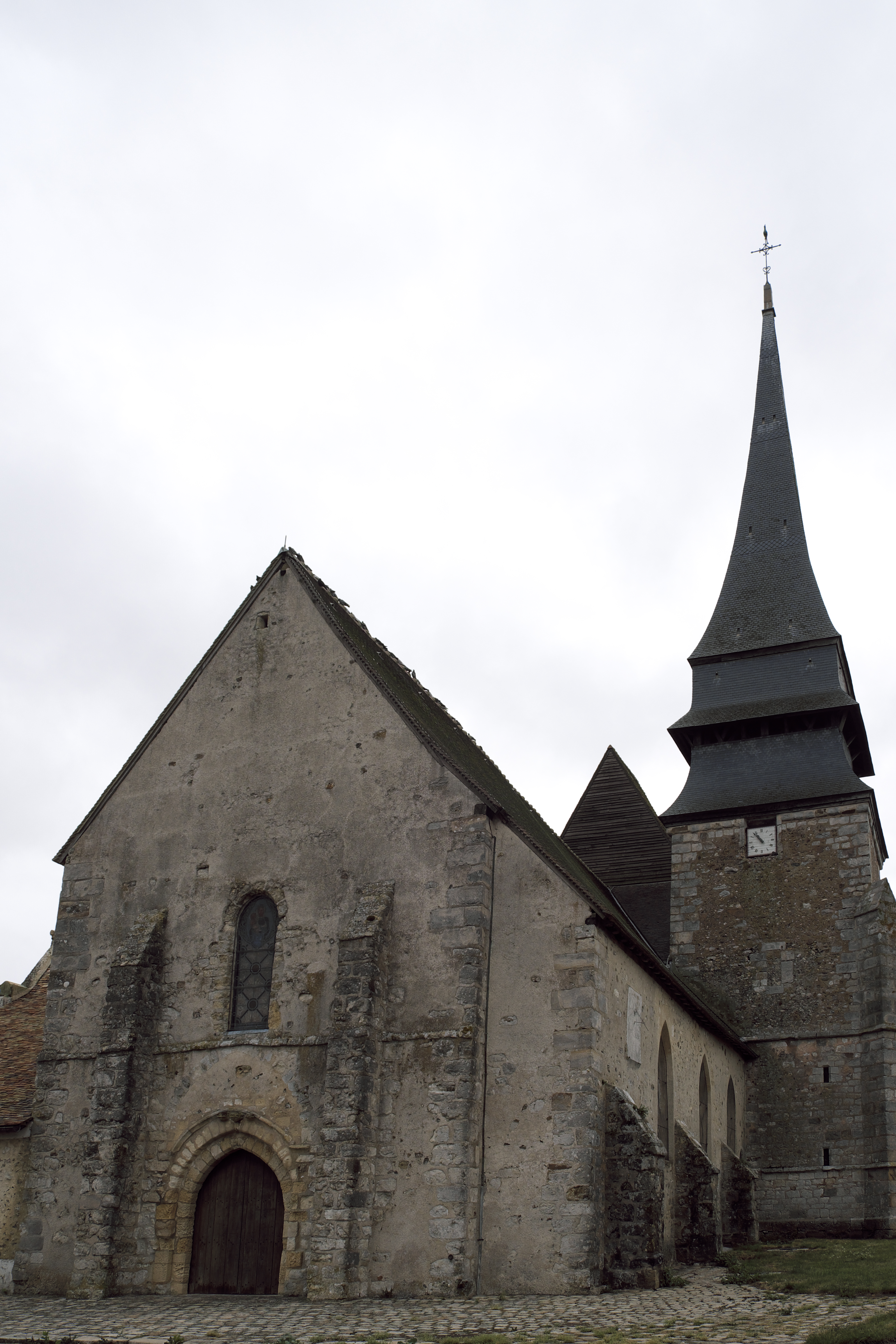 Katholische Pfarrkirche Notre-Dame in Bû im Département Eure-et-Loir (Centre-Val de Loire/Frankreich)